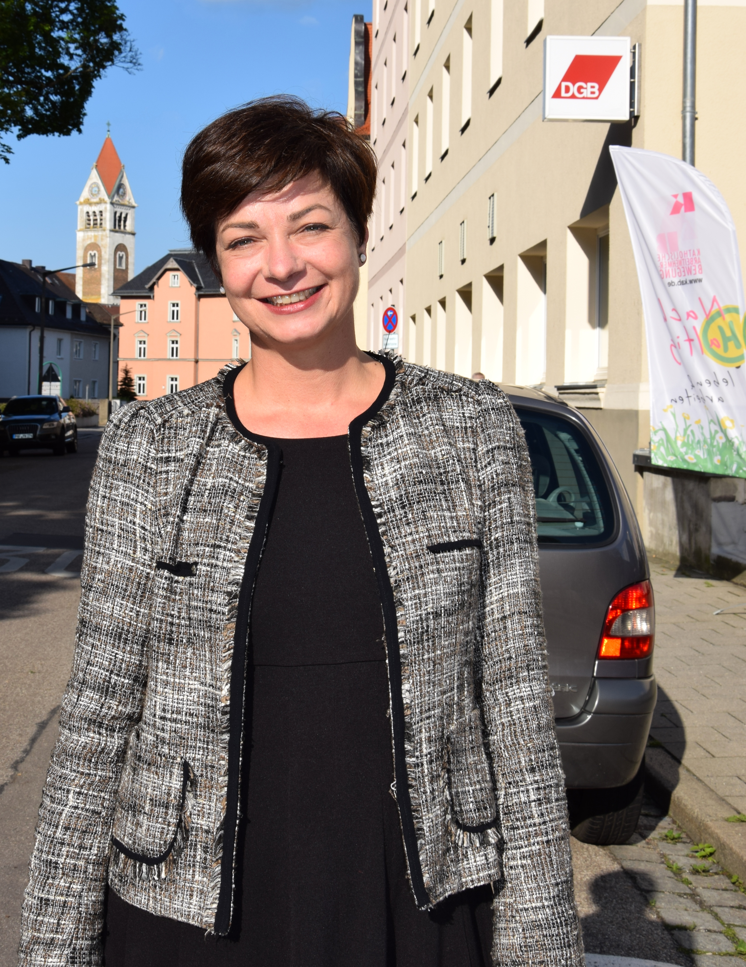 Arbeitnehmerempfang des DGB, 99. Deutscher Katholikentag in Regensburg - hier die KAB-Bundesvorsitzende Regina Stieler-Hinz.